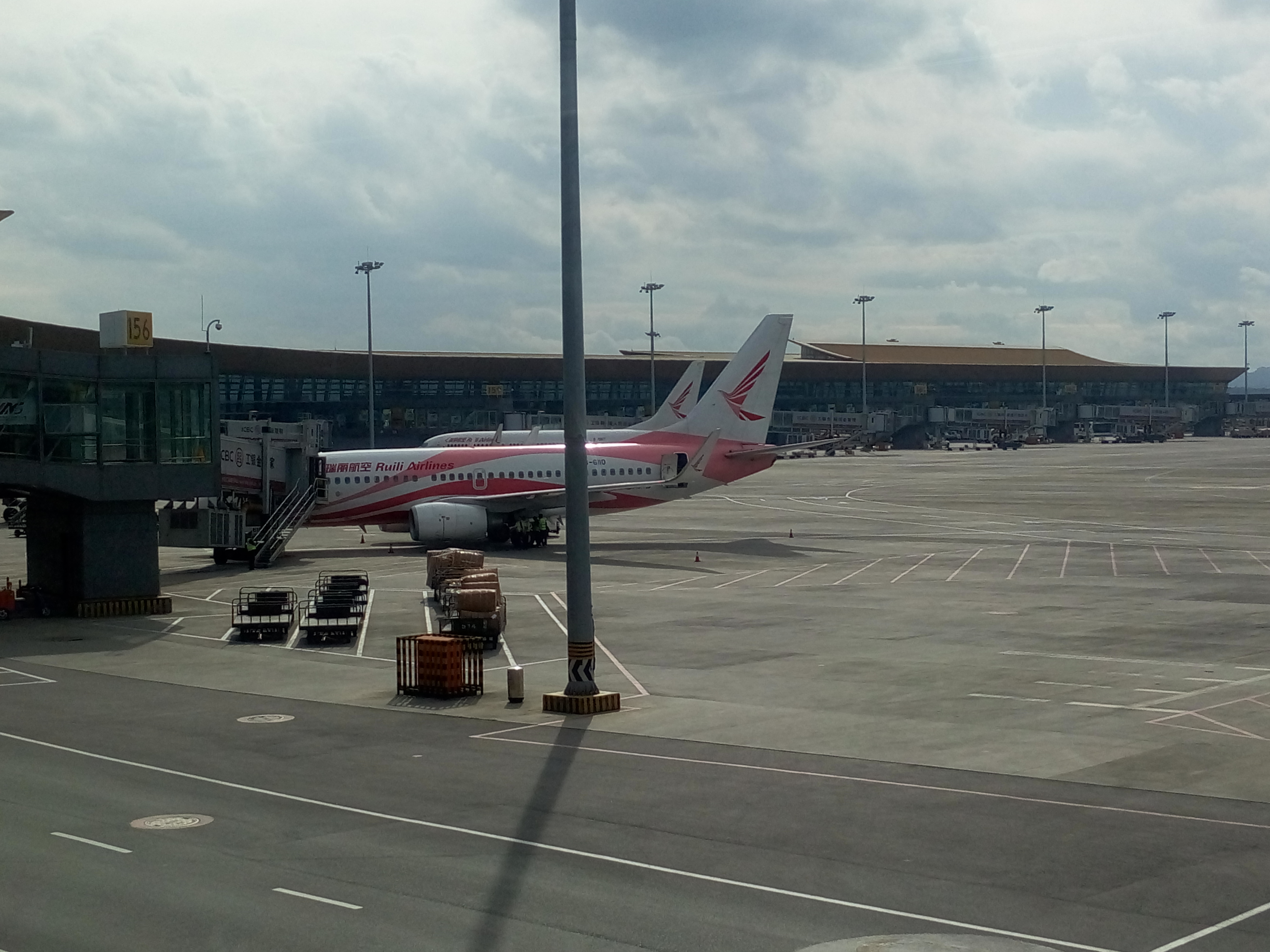 中文（中国大陆）: 昆明长水国际机场停机坪